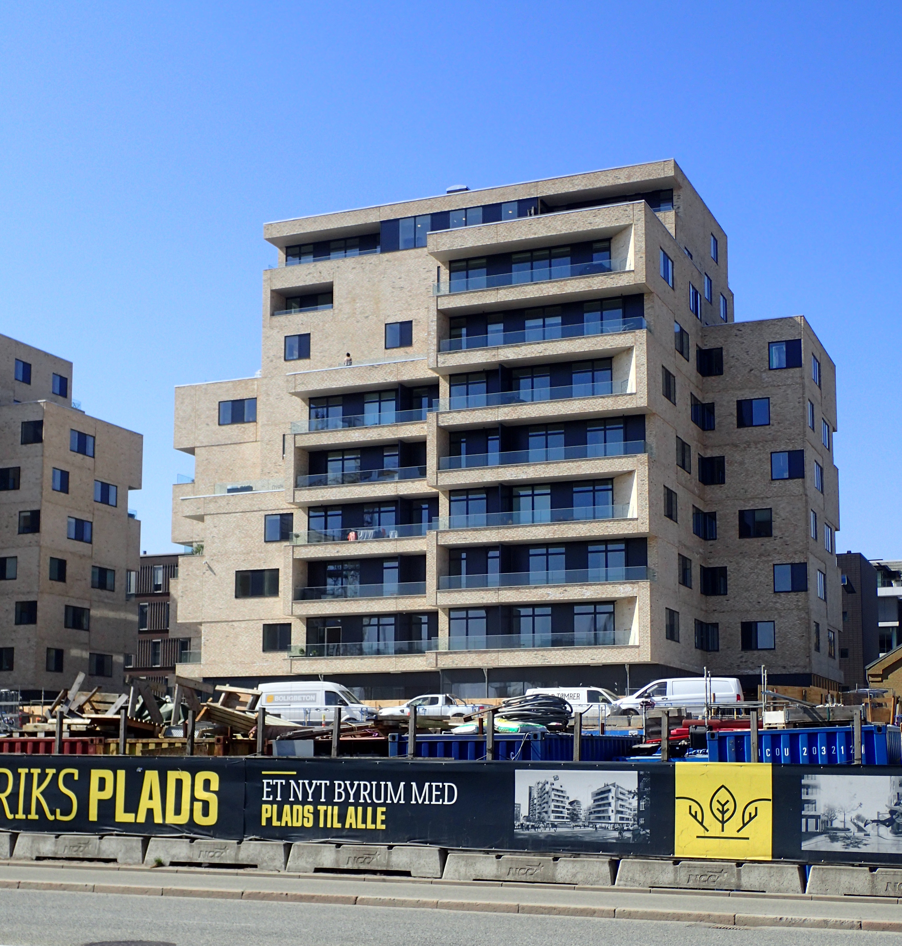 Lejligheder på Frederiks Plads i Aarhus.